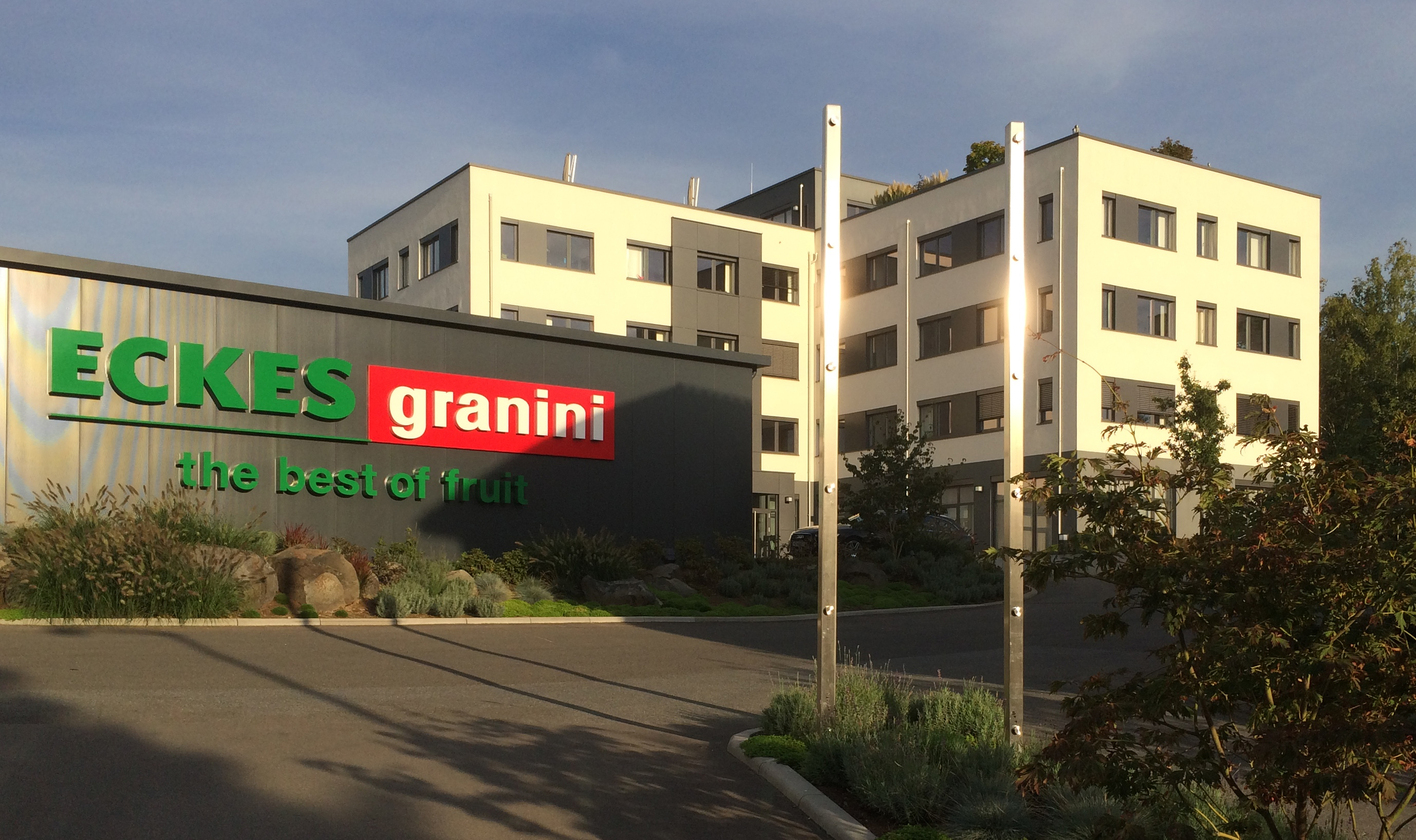 Eckes Firmenzentrale